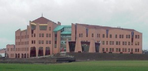 Gemeentepaleis